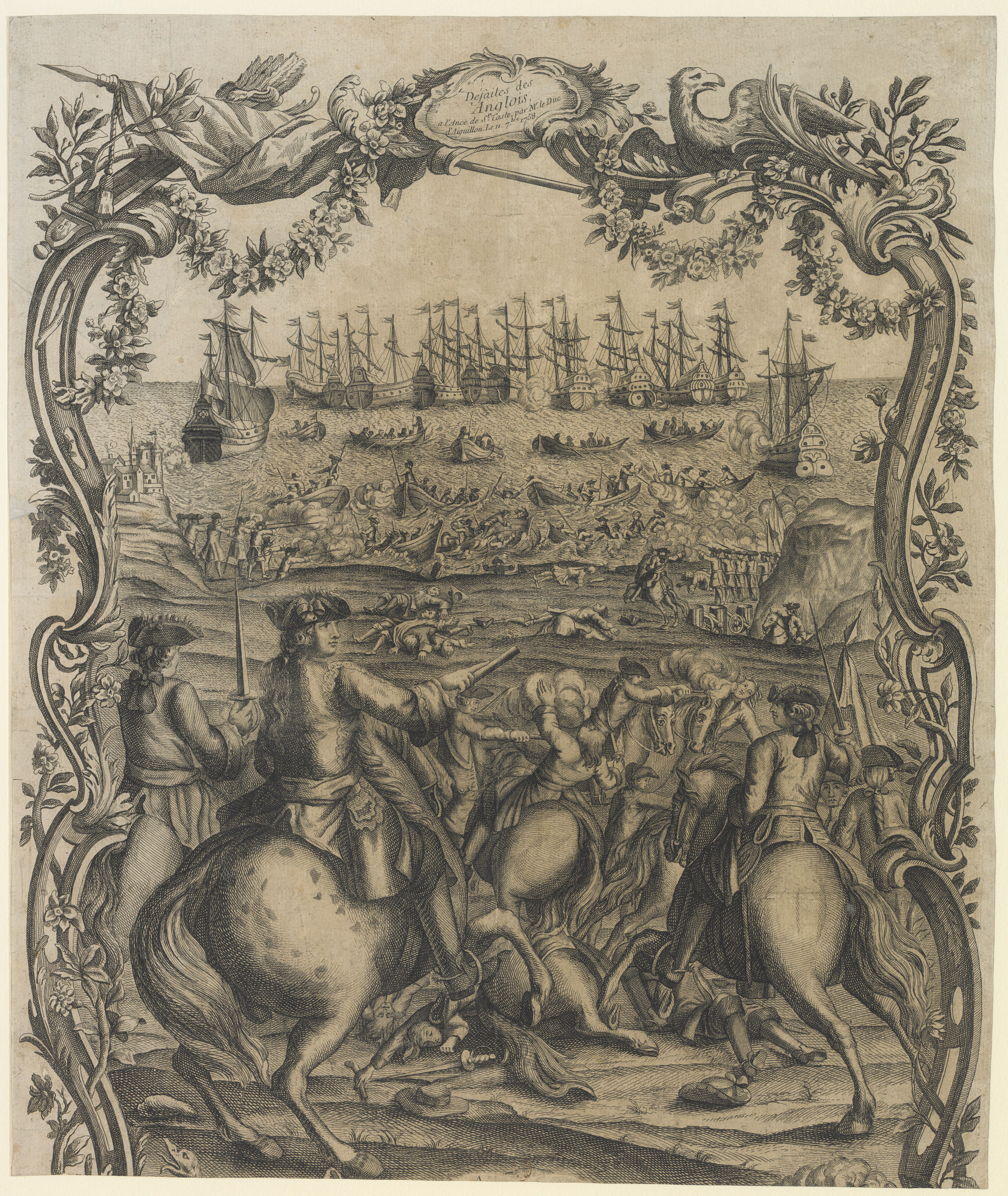 Defaites des Anglois à l'Ance de St Caste par Mr le duc d'Aiguillon le 11 septembre 1758